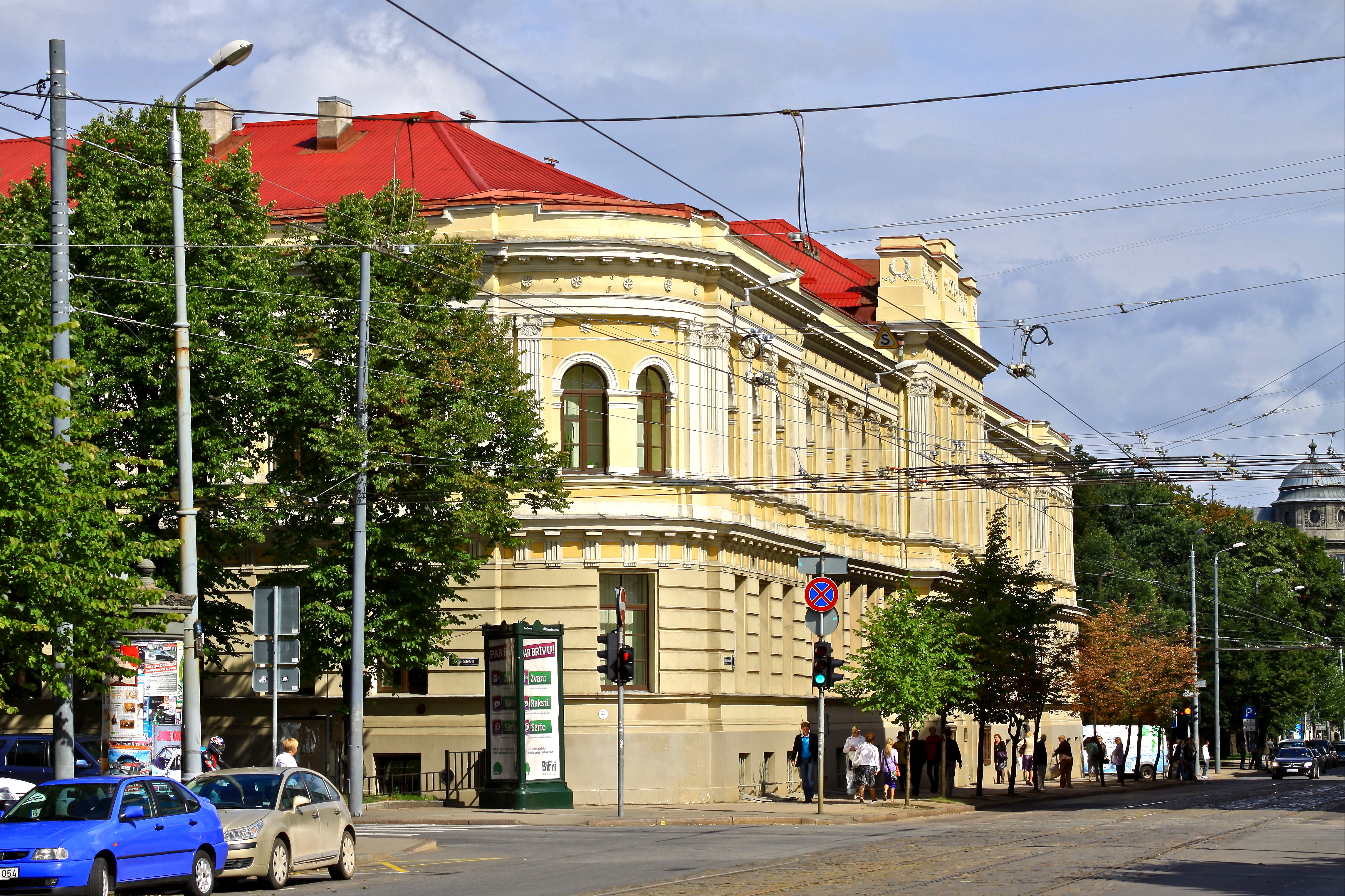 Фото здания Латвийской музыкальной академии